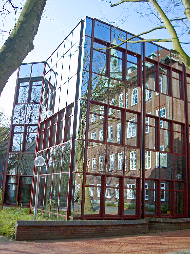 Mediothek (Baujahr 1984) des Evangelisch Stiftischen Gymnasiums zu Gütersloh, in der Spiegelung zu erkennen das Hauptgebäude von 1928